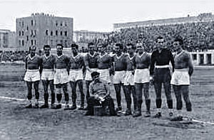 Formazione del Napoli nel campionato 1946/1947.